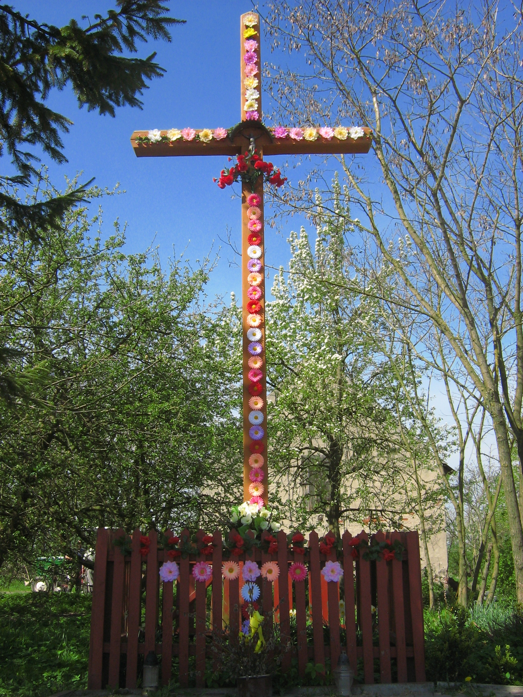 Krzyż w Korzęcinie